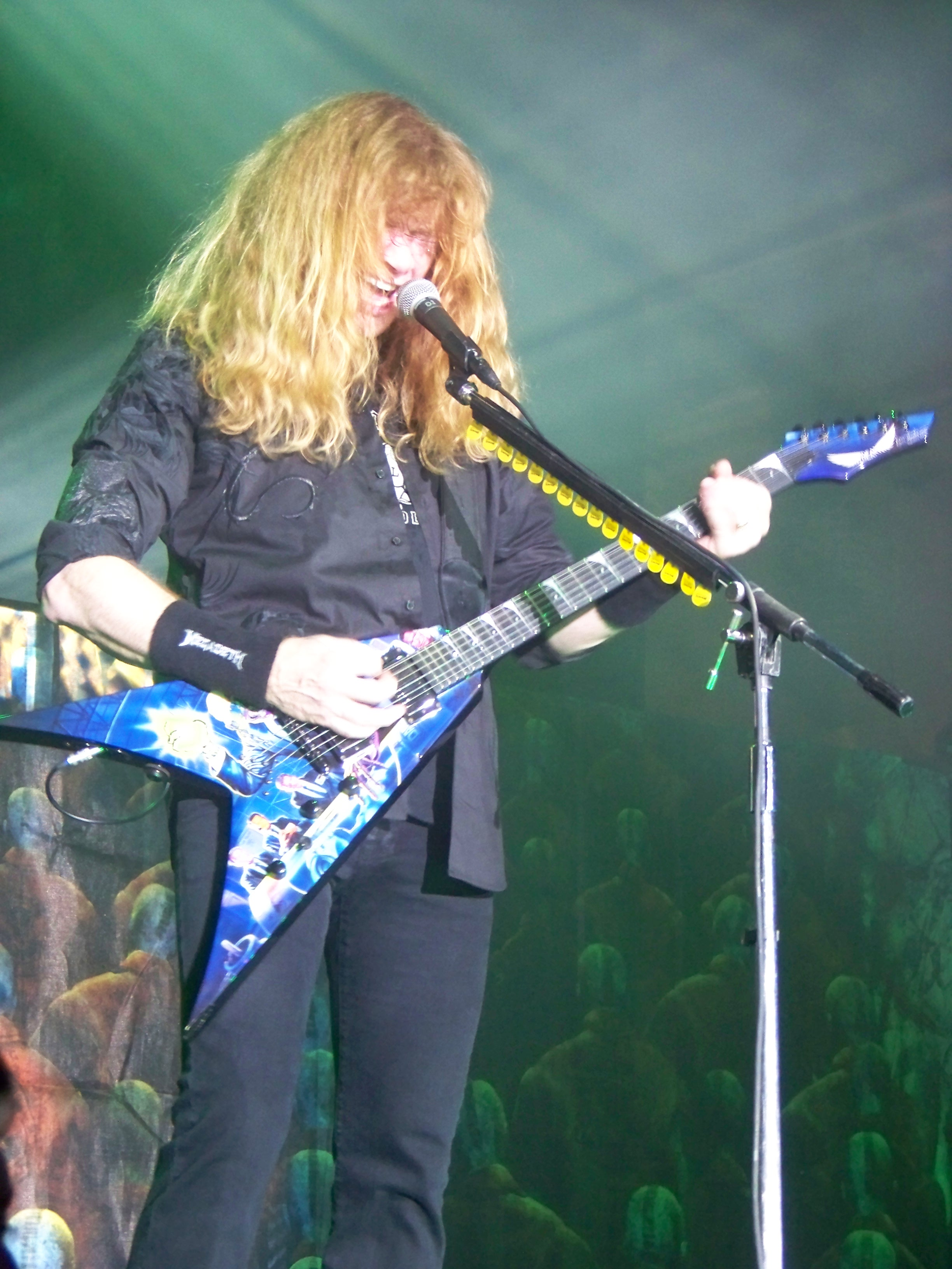 Фото Дэйва Мастейна из Megadeth. Март 2011, Киев, концерт Megadeth и Slayer.